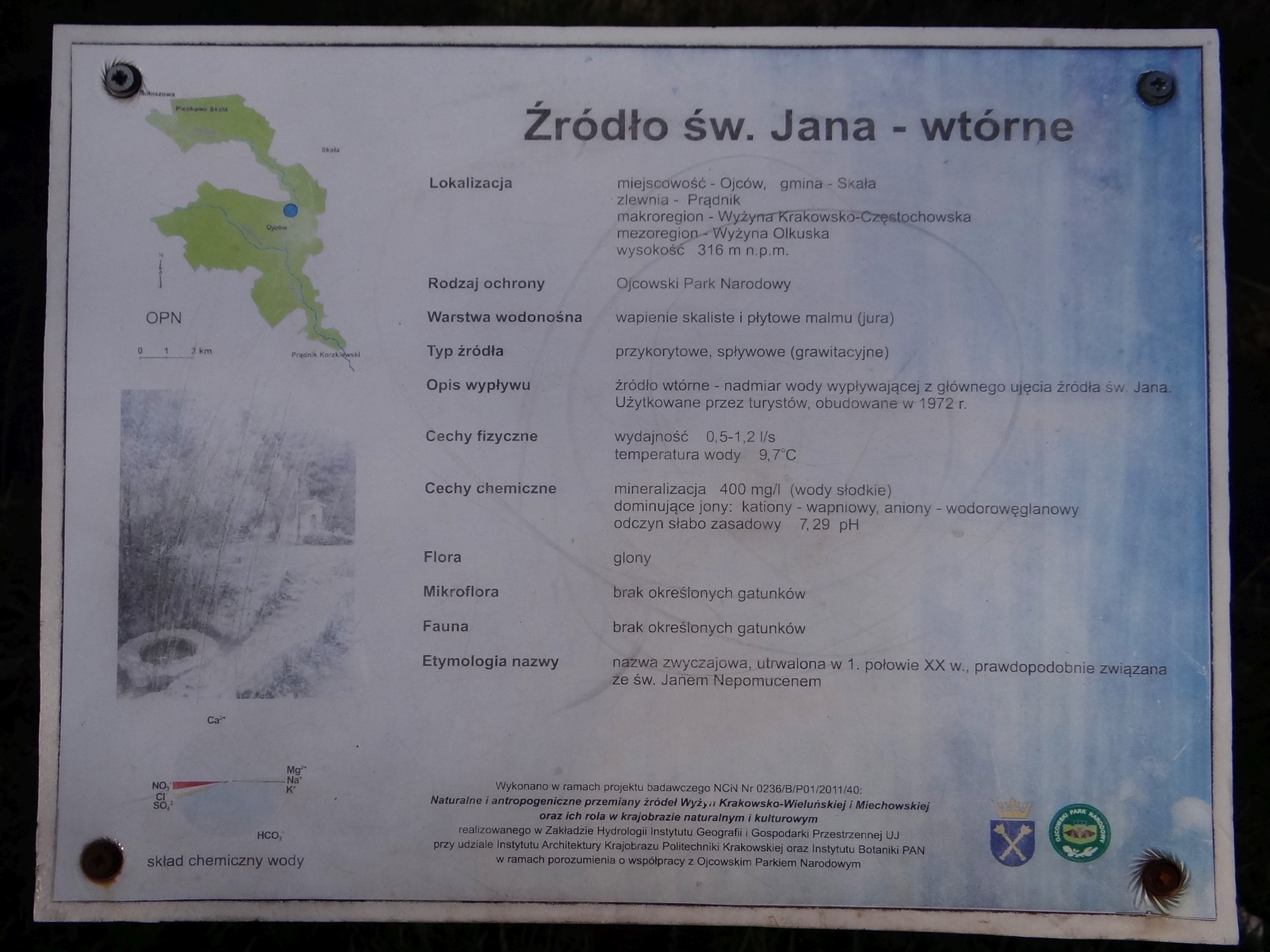 Źródło św. Jana w Ojcowskim Parku Narodowym